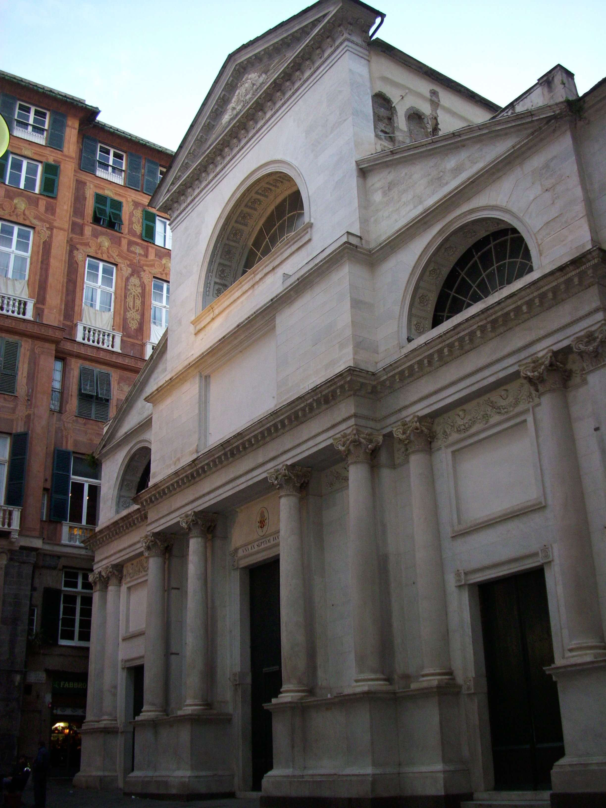 La Basilica di Santa Maria delle Vigne